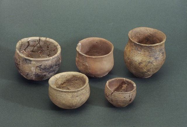 Kauniaisista löytyneitä nuorakeraamisen eli vasarakirveskulttuurin saviastioita